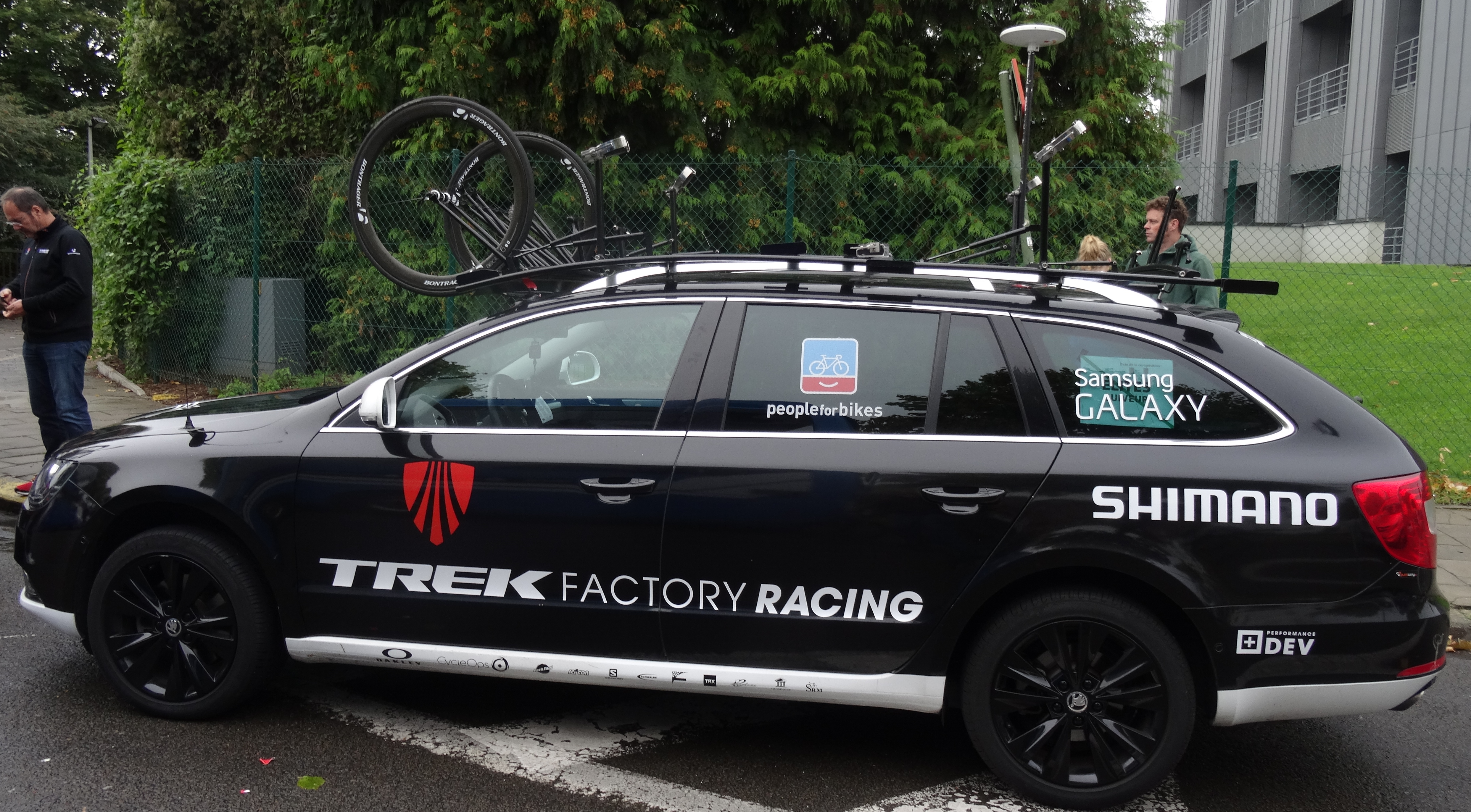 Reportage photographique réalisé le dimanche 5 octobre à l'occasion du départ de la quatrième étape de l'Eurométropole Tour 2014 à Mons, Belgique.